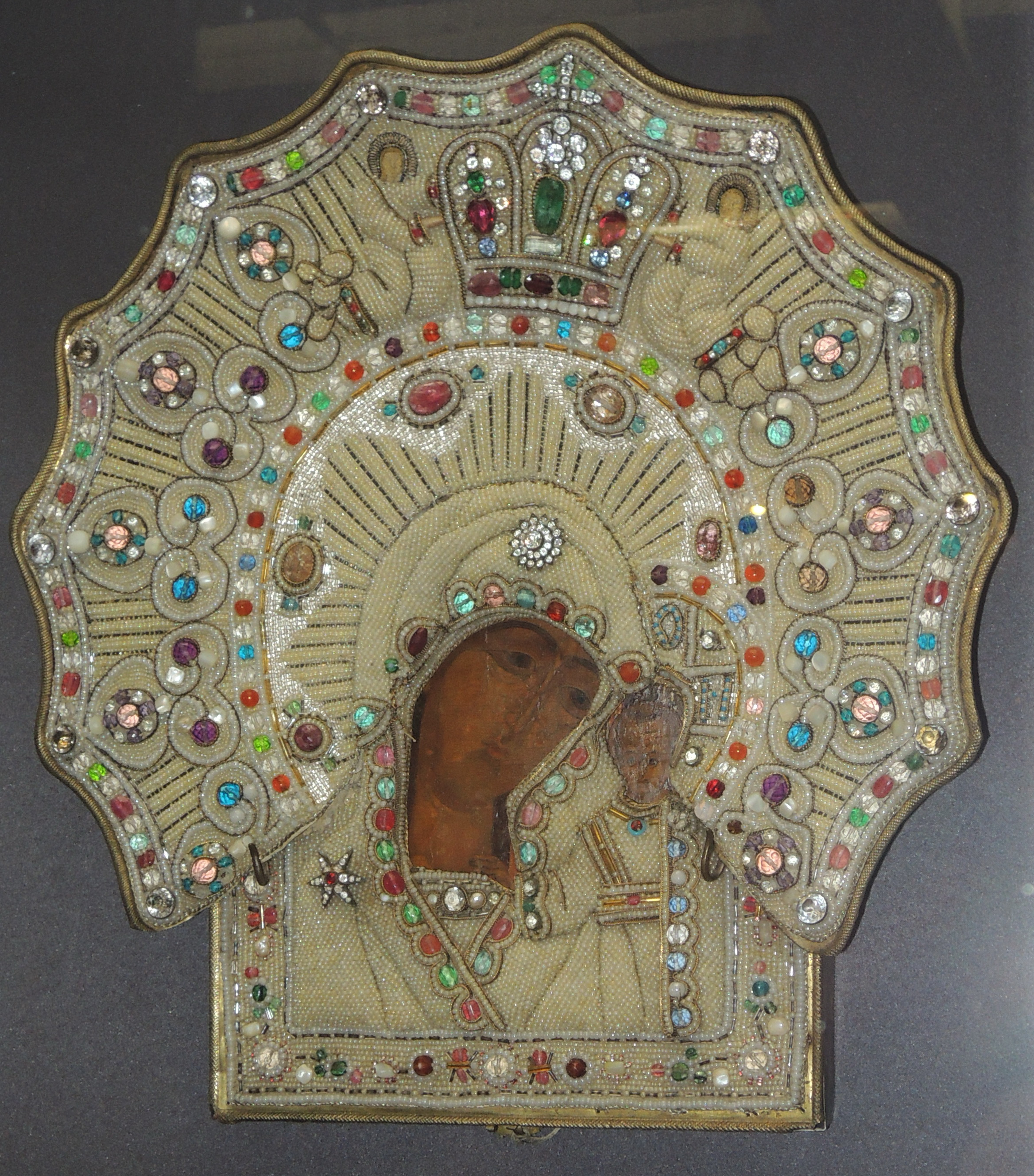 Икона "Богоматерь Казанская". 16-17 вв., оклад - 1881 год. Ярославский музей-заповедник.